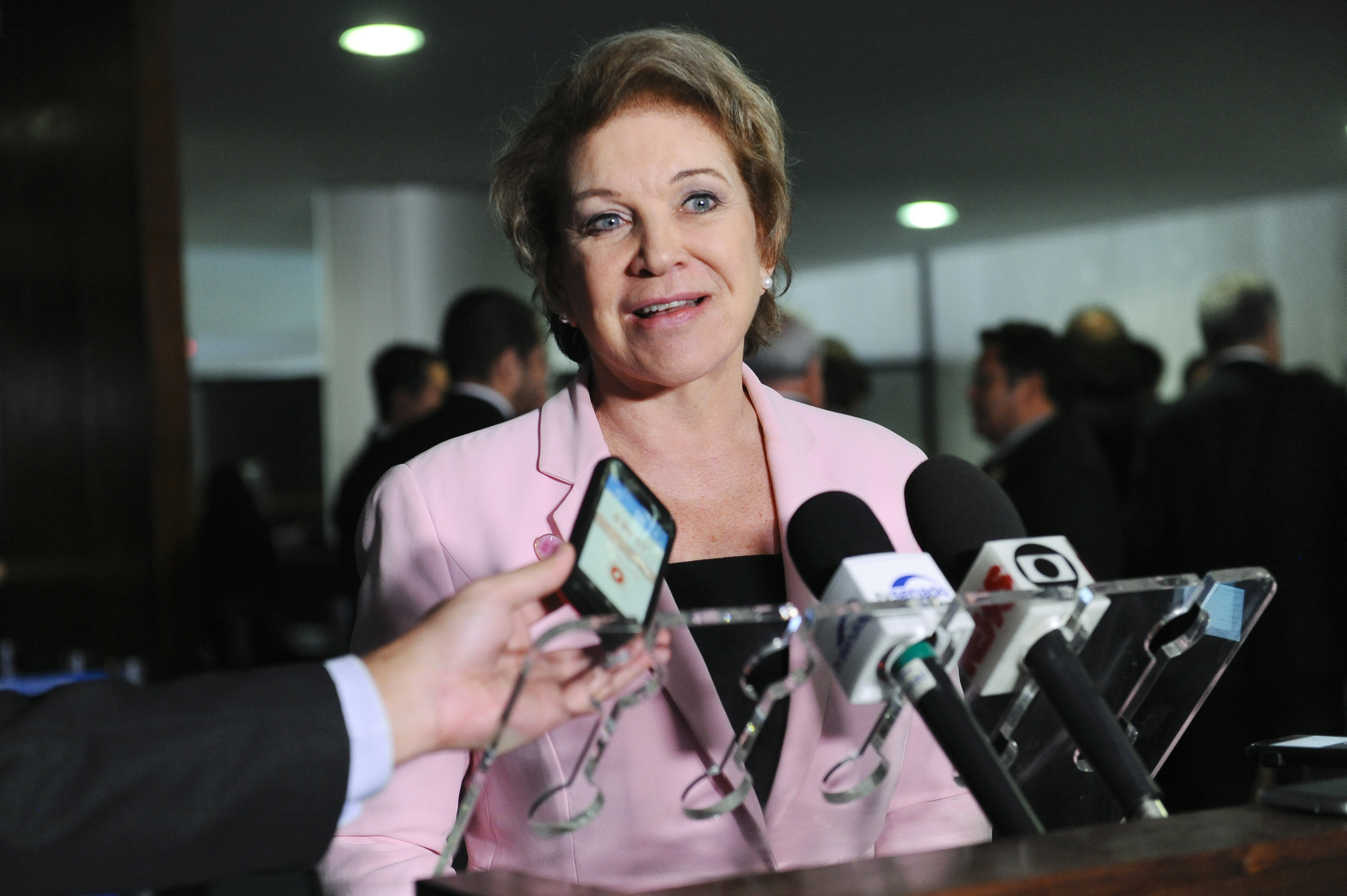 Senadora Marta Suplicy (PMDB-SP) concede entrevista. Foto: Jane de Araújo/Agência Senado